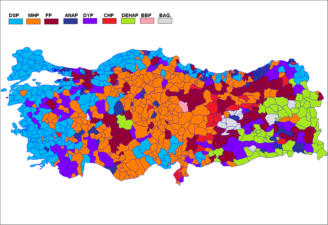 1999 genel seçim sonuçlarının Türkiye haritasında ilçe ilçe gösterimi.